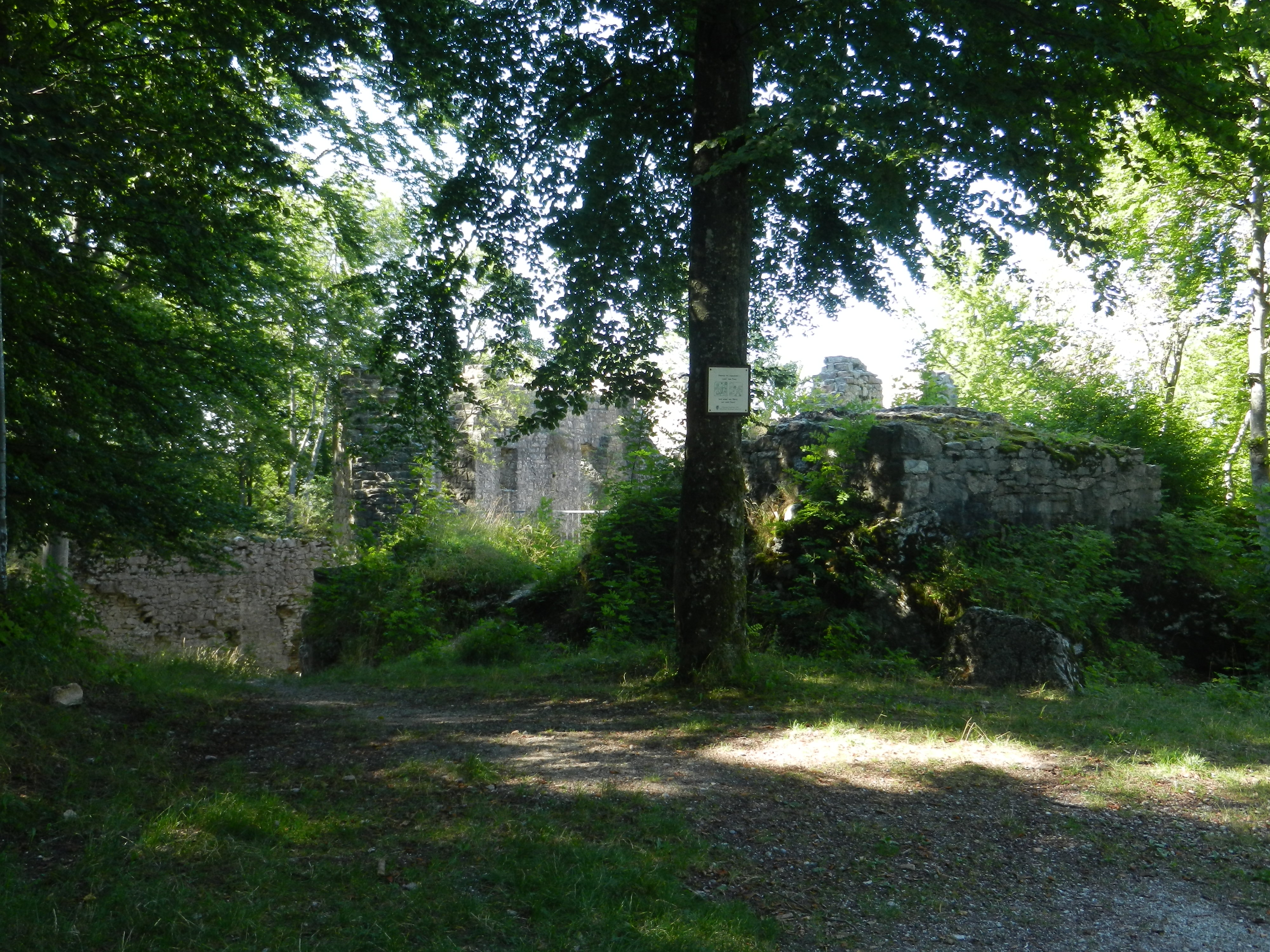 Hohenmelchingen bei Melchingen, Ortsteil von Burladingen, Bergfried und Vorderhaus